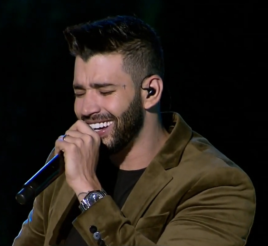 Gusttavo Lima em 2018